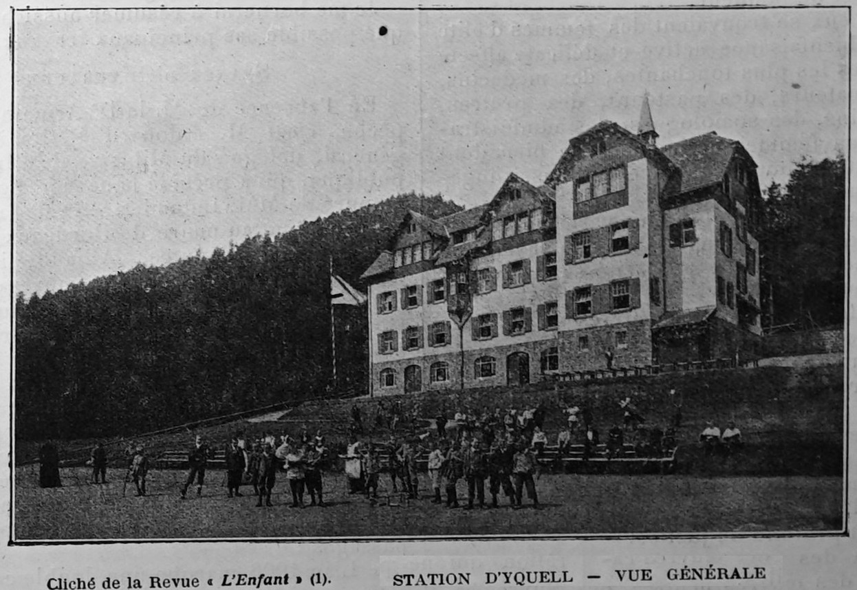 ferienheim Yquelle publié en 1906.